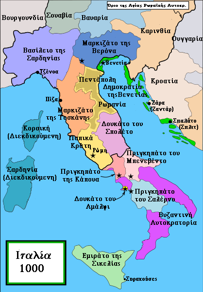 Η Ιταλία περί το 1000 μ.Χ.